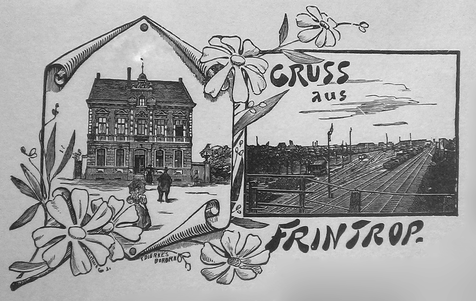 Ansichtskarte: links das Haus der Gaststätte "Bremer" in Unterfrintrop, rechts der Rangier und Sammelbahnhof, der von der Köln-Mindener Eisenbahn-Gesellschaft 1885 errichtet wurde